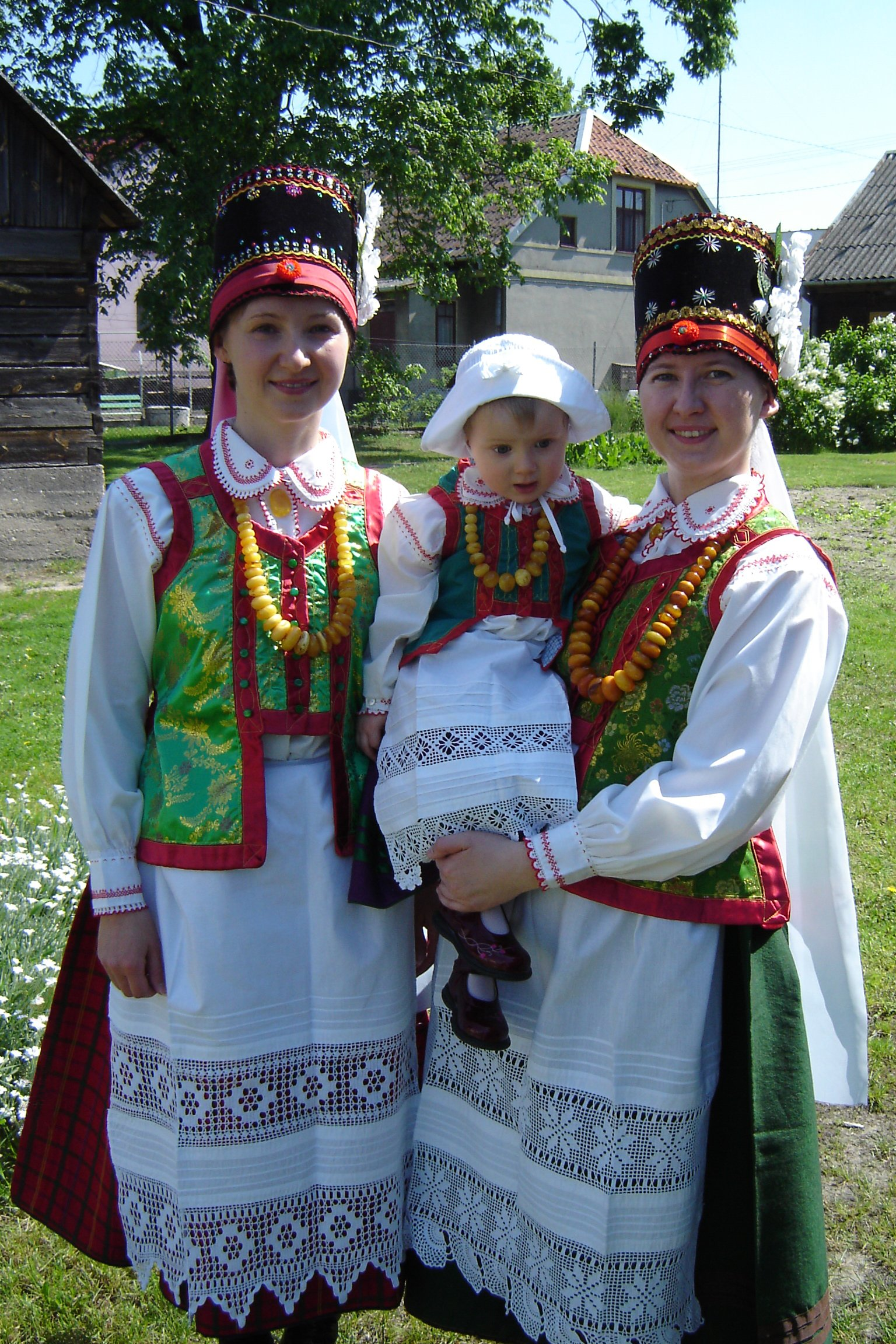 Stroje ludowe na Kurpiach